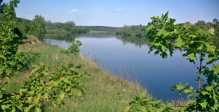 Nadbużański krajobraz.